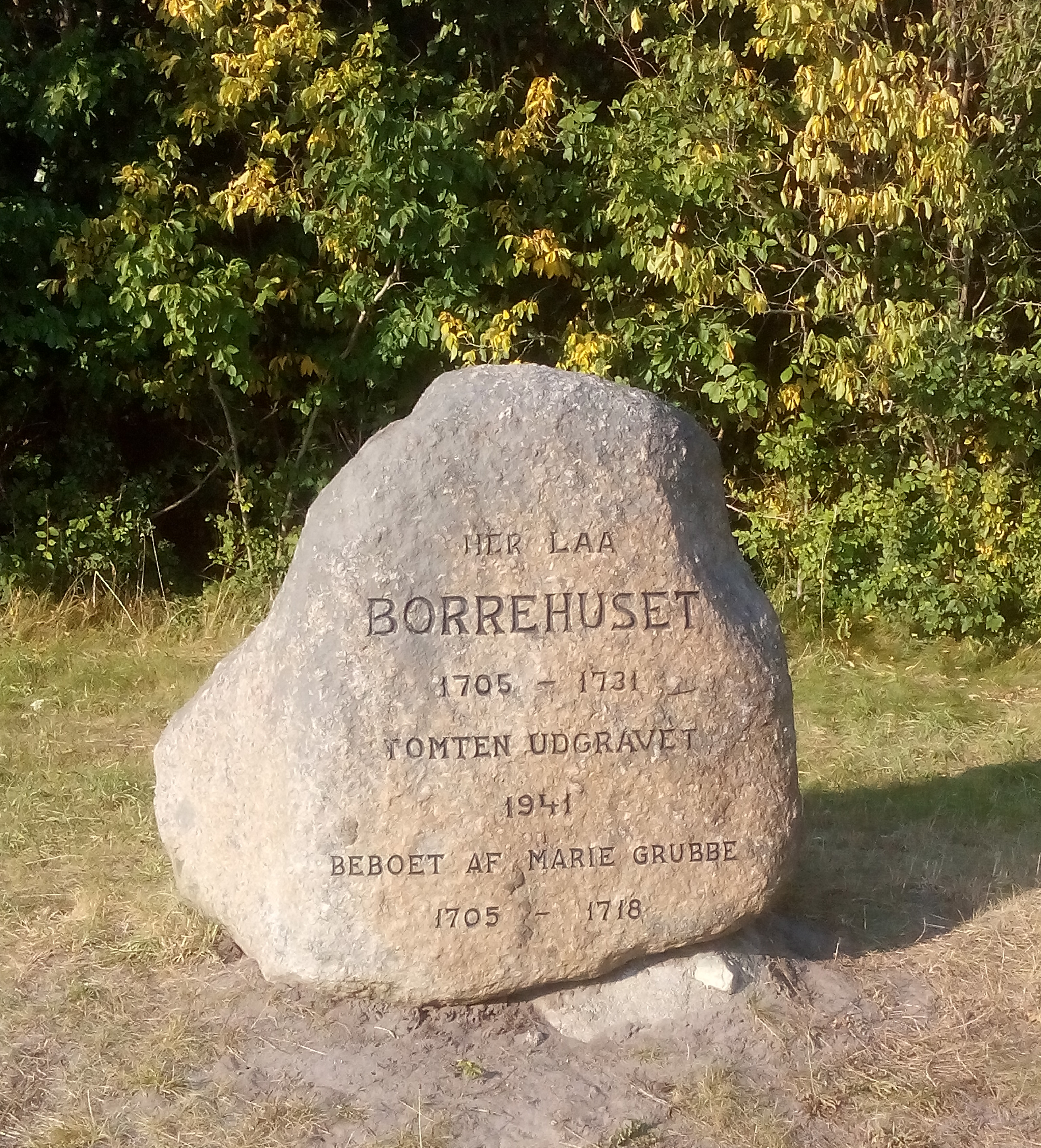 Mindestenen hvor Borrehuset stod hvori Marie Grubbe levede. Fotoet er taget 9 aug. 2020. Koordinater: 54°53'09.9"N 12°07'07.3"E - 54.886089, 12.118694.